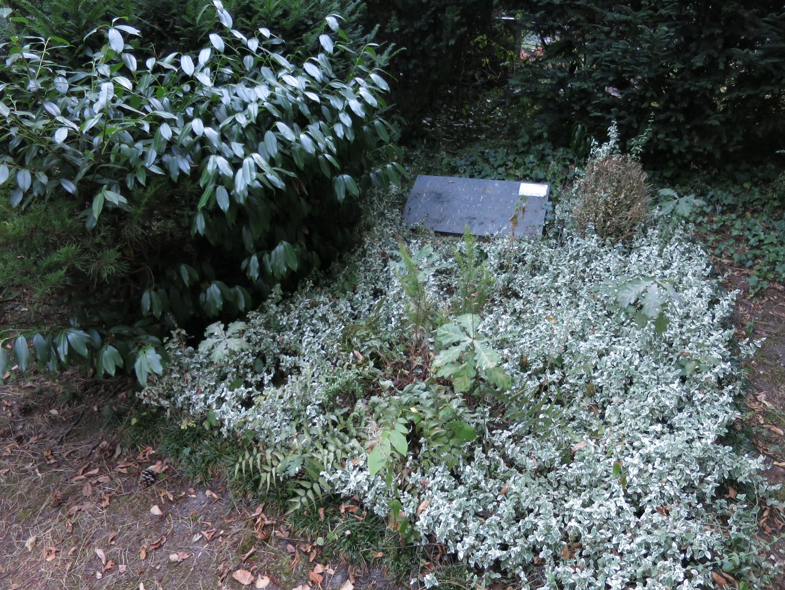 Josef Koch - Grab auf Melaten-Friedhof (mit Hinweis auf Abräumung der Grabstelle)